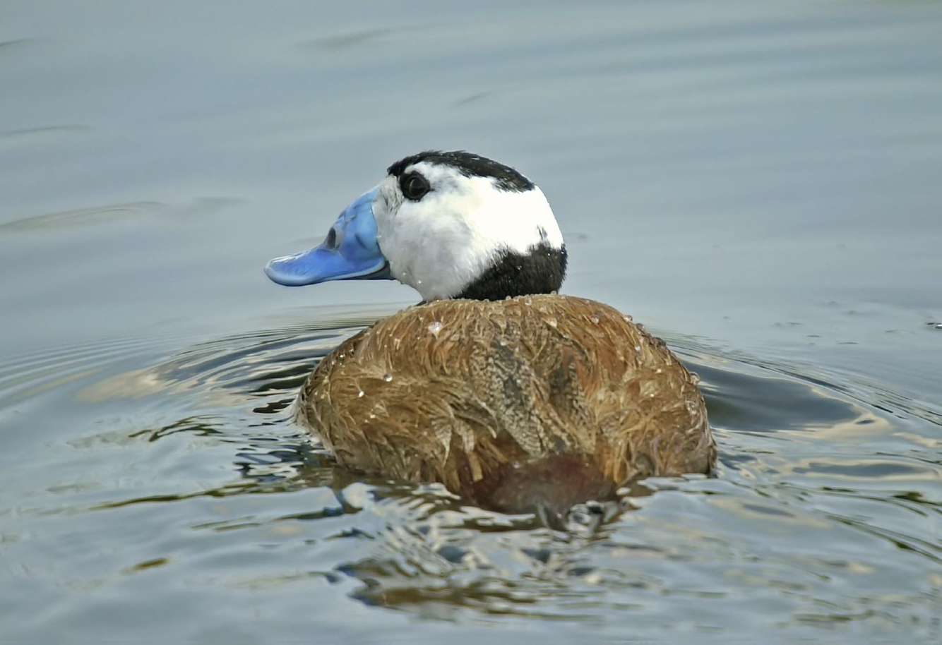 Malvasía cabeciblanca - Ànec cap-blanc - White-headed Duck - Oxyura leucocephala, male, Clot-de-Galvany, Alicante, España